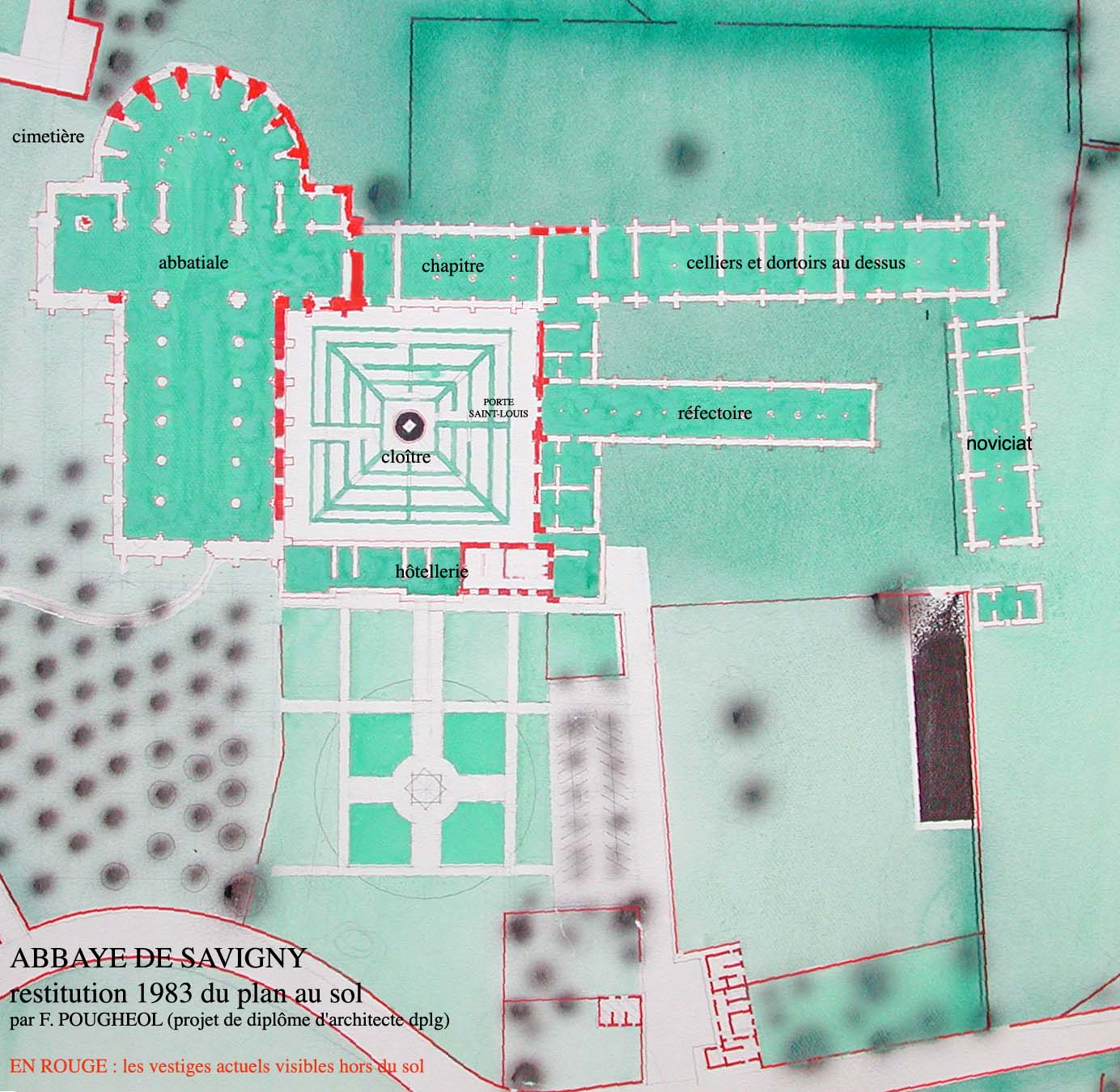 plan des ruines de l'abbaye de Savigny le Vieux